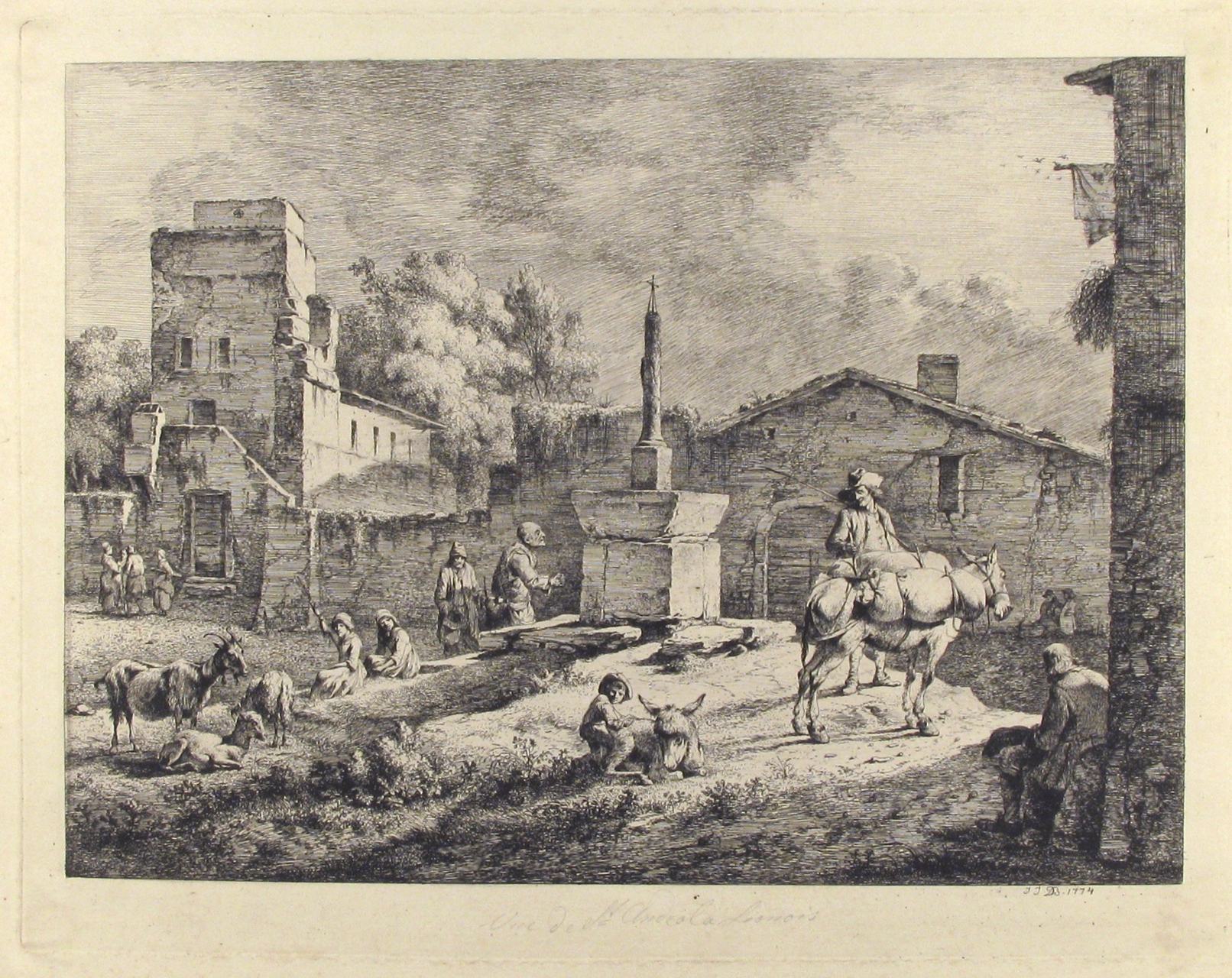 Vue de Saint Andéol, gravure à la pointe sèche de Jean-Jacques de Boissieu (MET Museum)